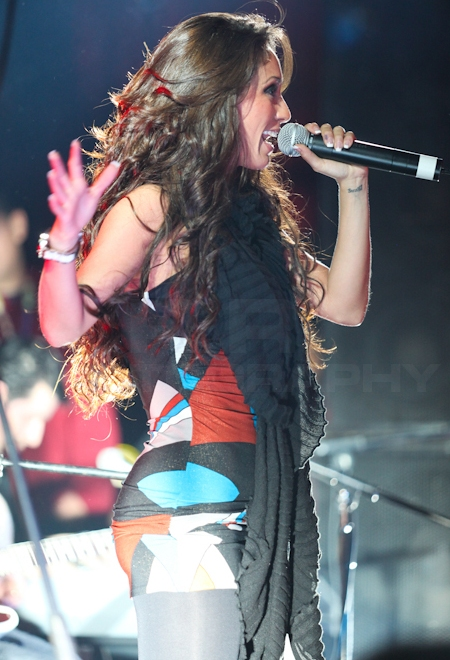 Anahí durante la Tocada Pulsar en Tiffanys, como parte de Mi Delirio World Tour, en Tijuana, México. Jueves 21 de octubre de 2010.